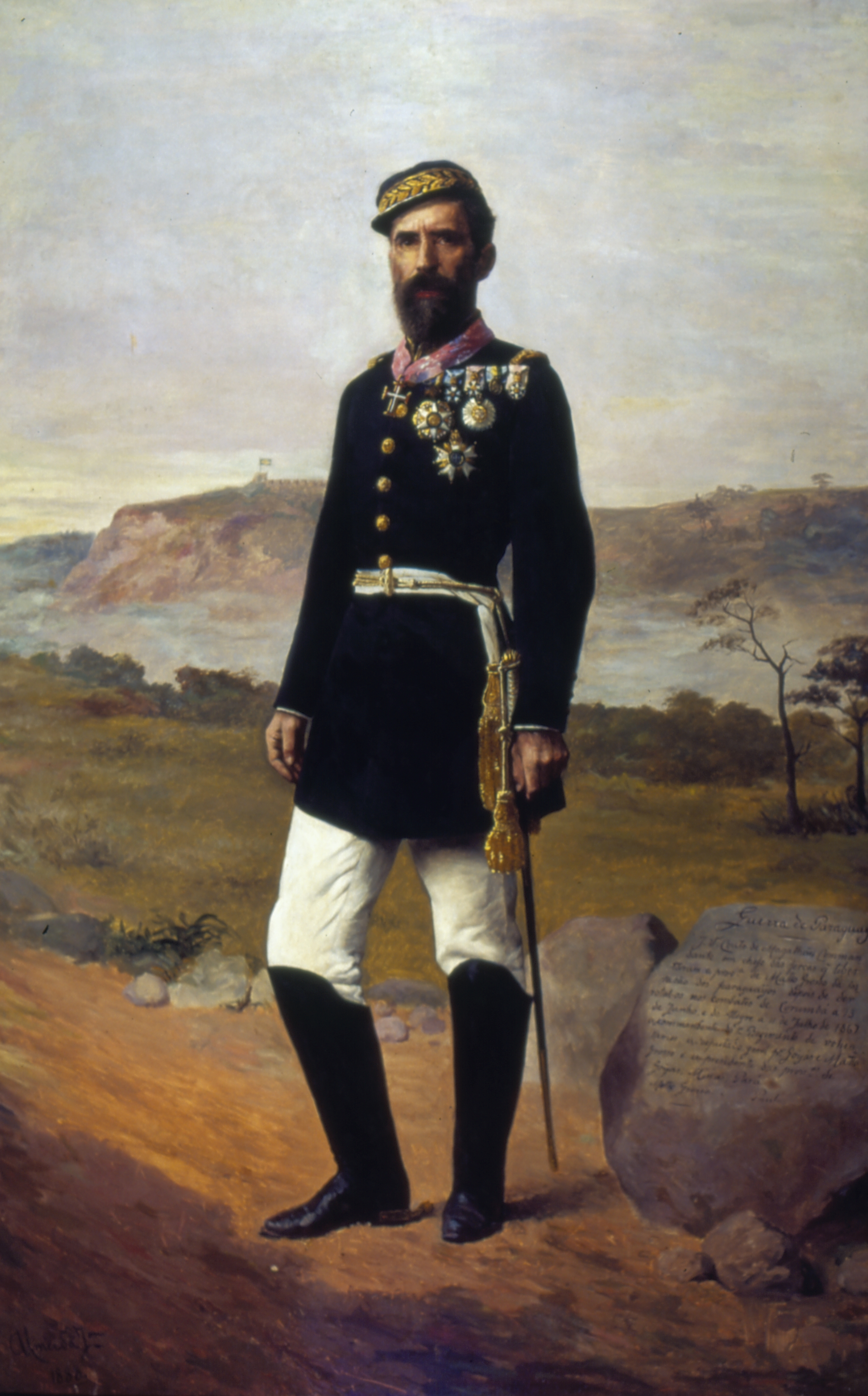 Obra que integra o acervo do Museu Paulista da USP.